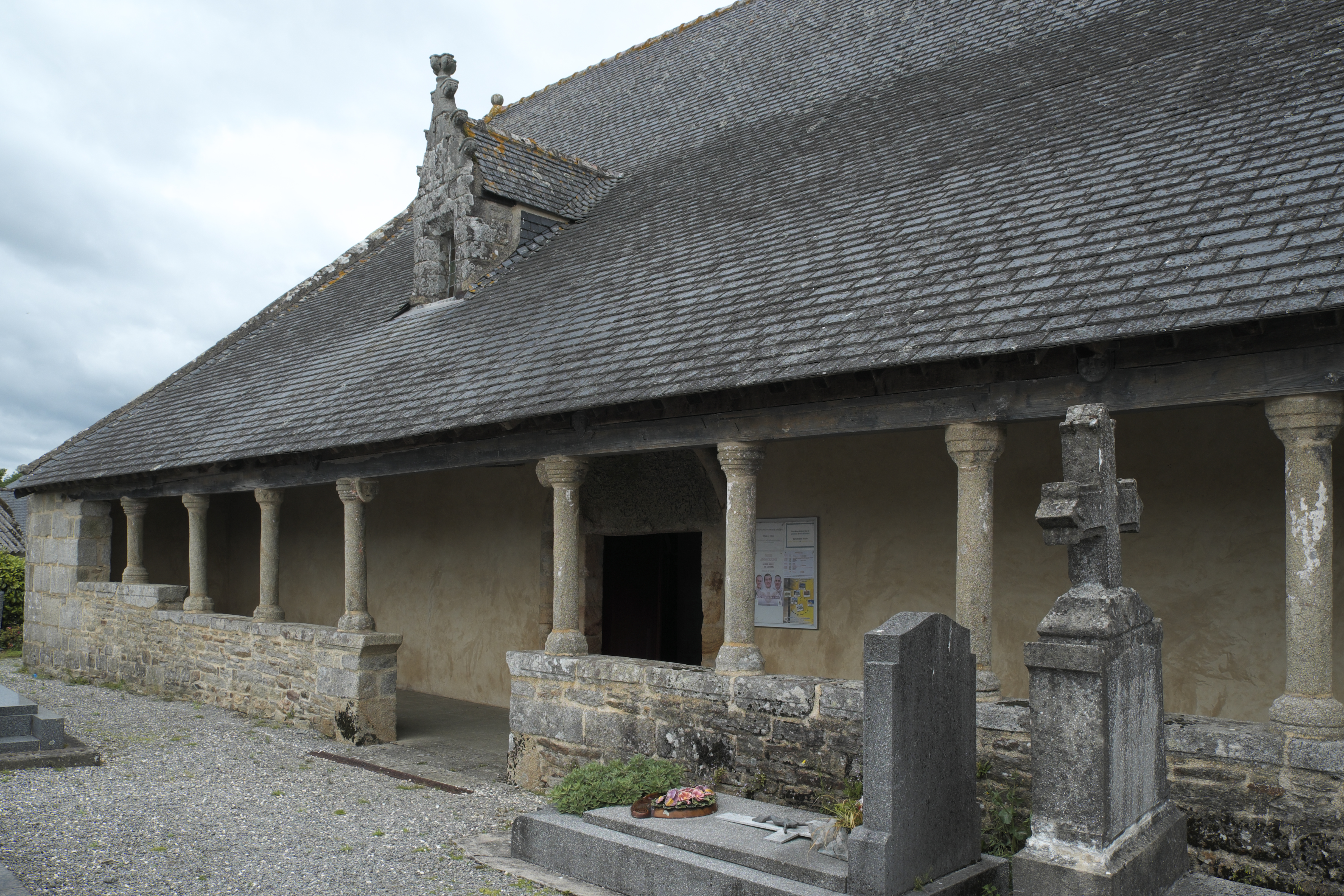 Katholische Pfarrkirche Ste-Trinité (Dreifaltigkeitskirche) in Calan im Département Morbihan (Region Bretagne/Frankreich), Galerie an der Südseite